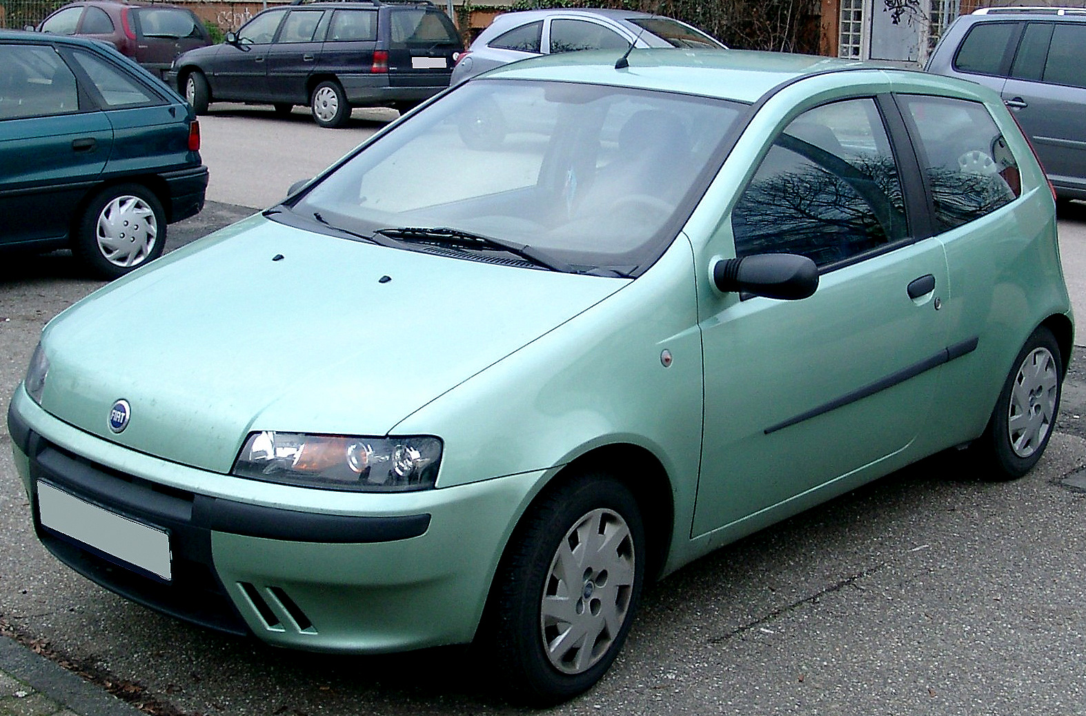 Fiat Punto, 2. Generation